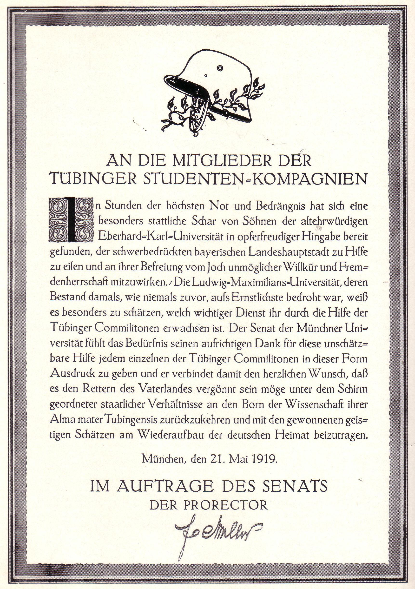 Öffentlicher Dank der Universität München an die Tübinger Studenten für ihre Hilfe im Kampf der Novemberrevolution 1918/19